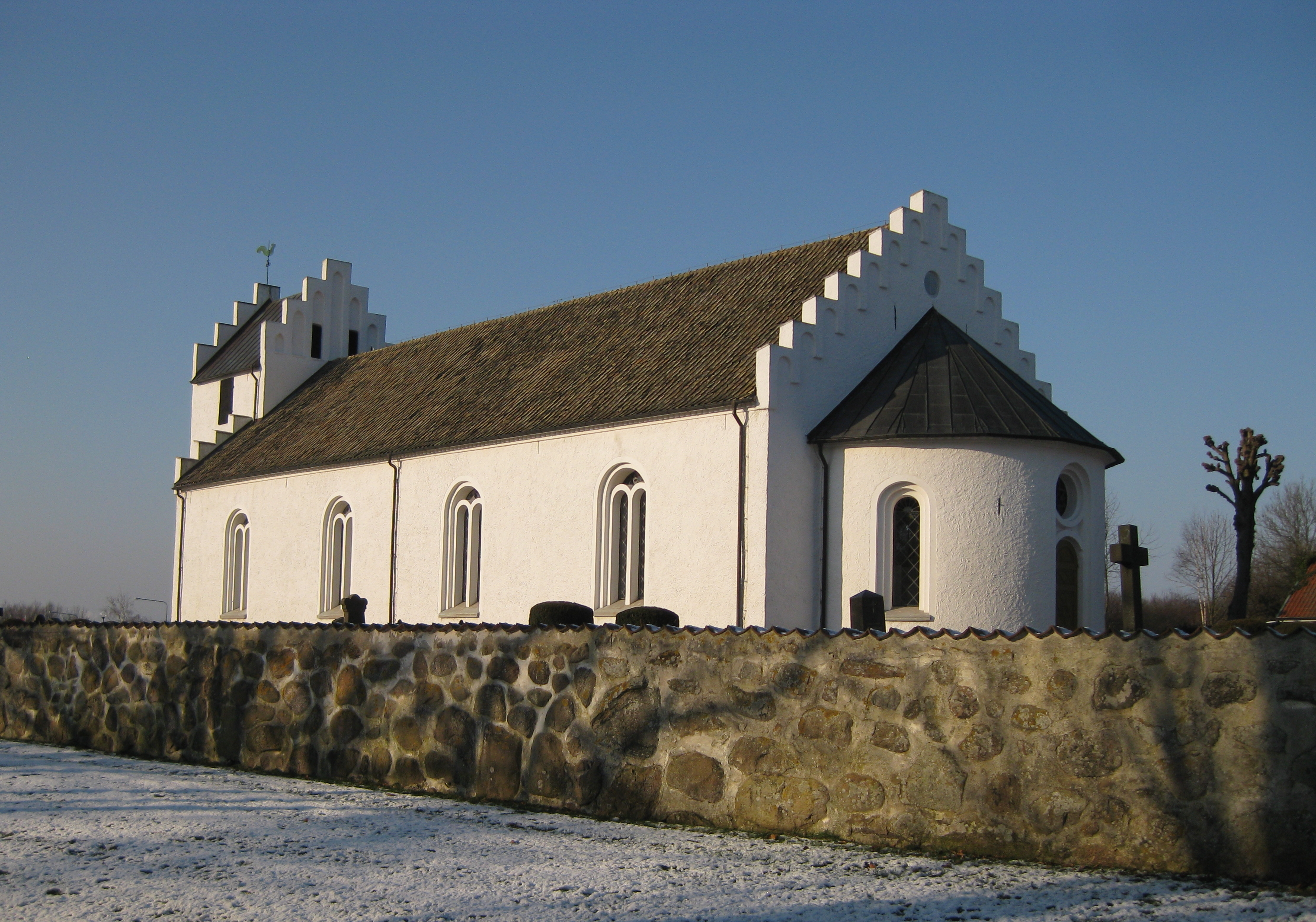 Bårslövs kyrka 2012